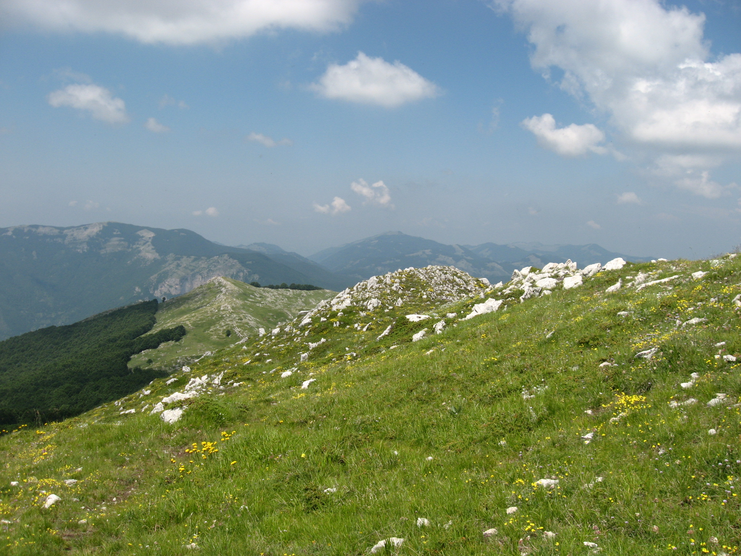 Bergtoppen van Simbrini in de buurt van Filettino